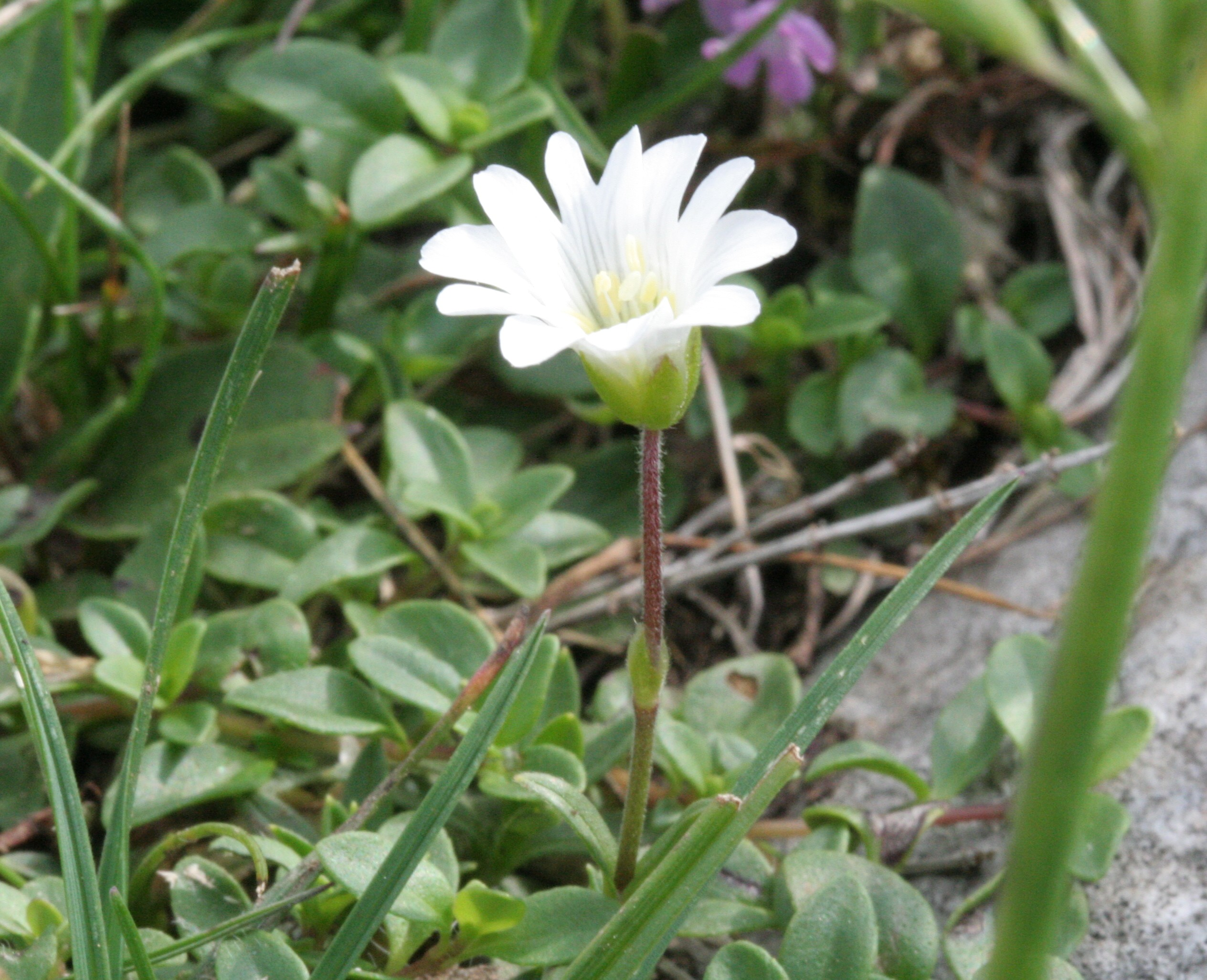 Cerastium alpinum (Peverina alpina)